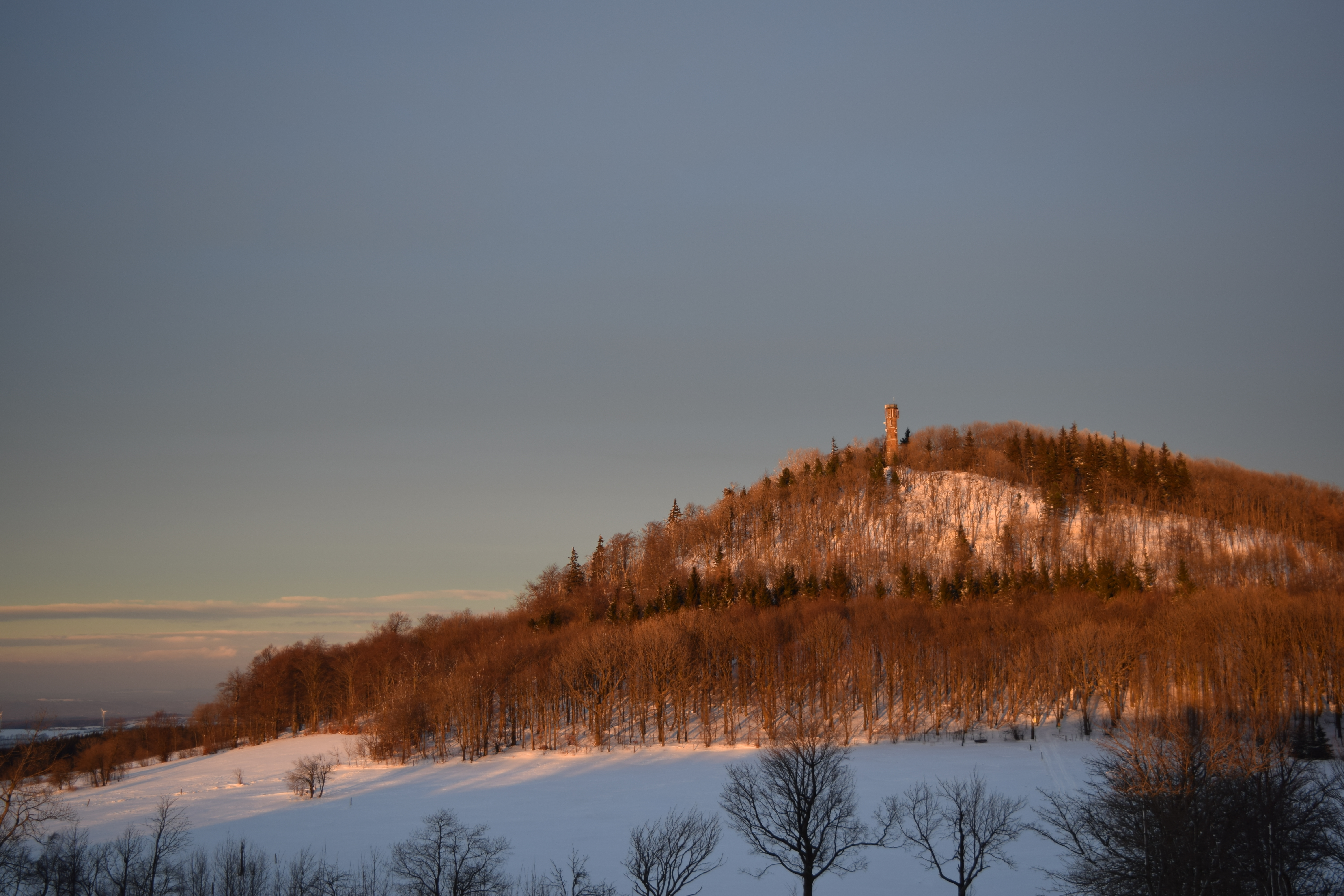 Geisingberg im Winter